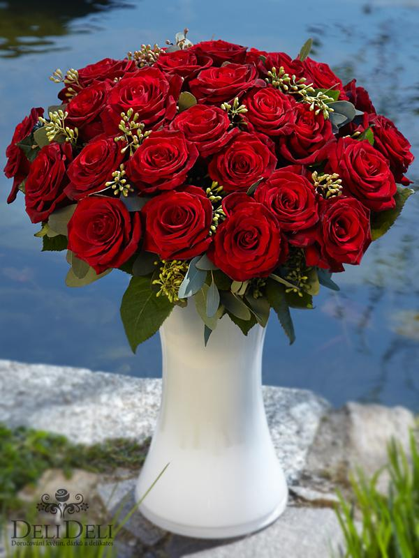 Cervene ruze grand prix